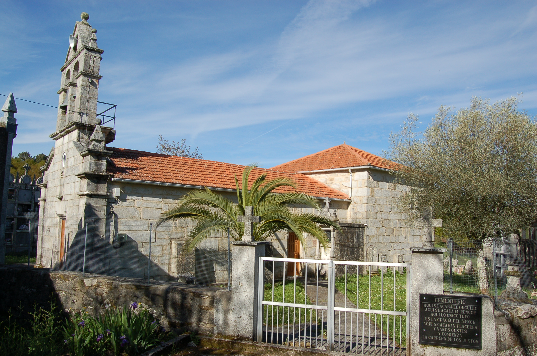 Igrexa parroquial de Santa Mariña de Córcores, no concello de Avión